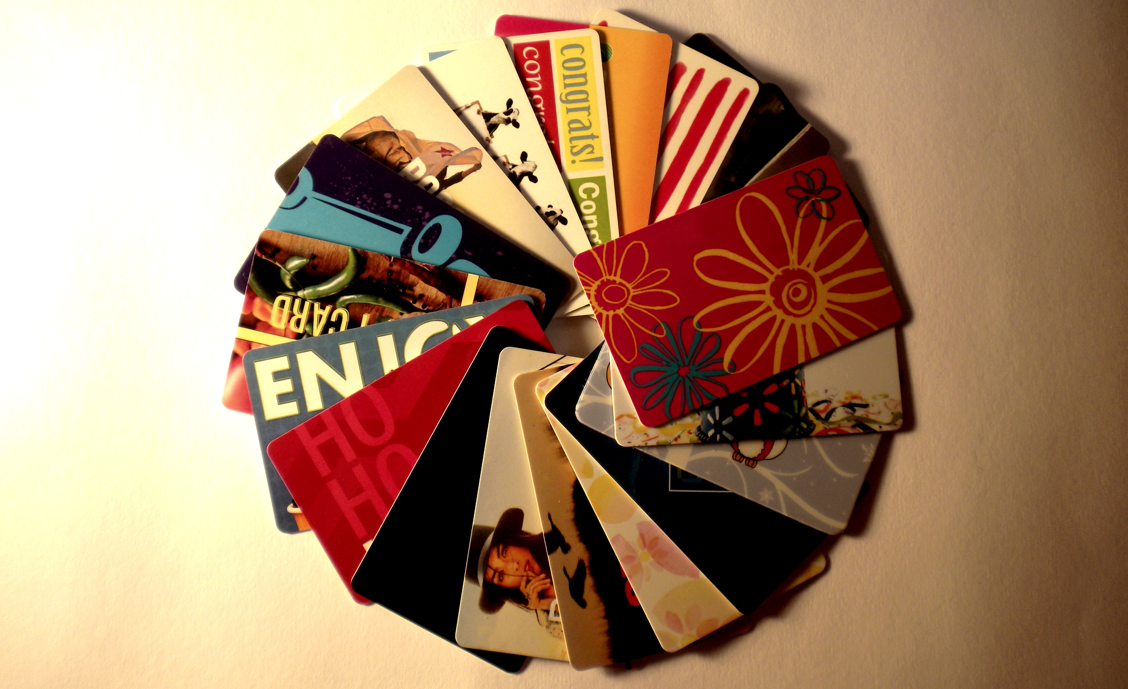 Dárkové karty mohou disponovat různými vlastnostmi a jejich design slouží jako efektivní marketing.